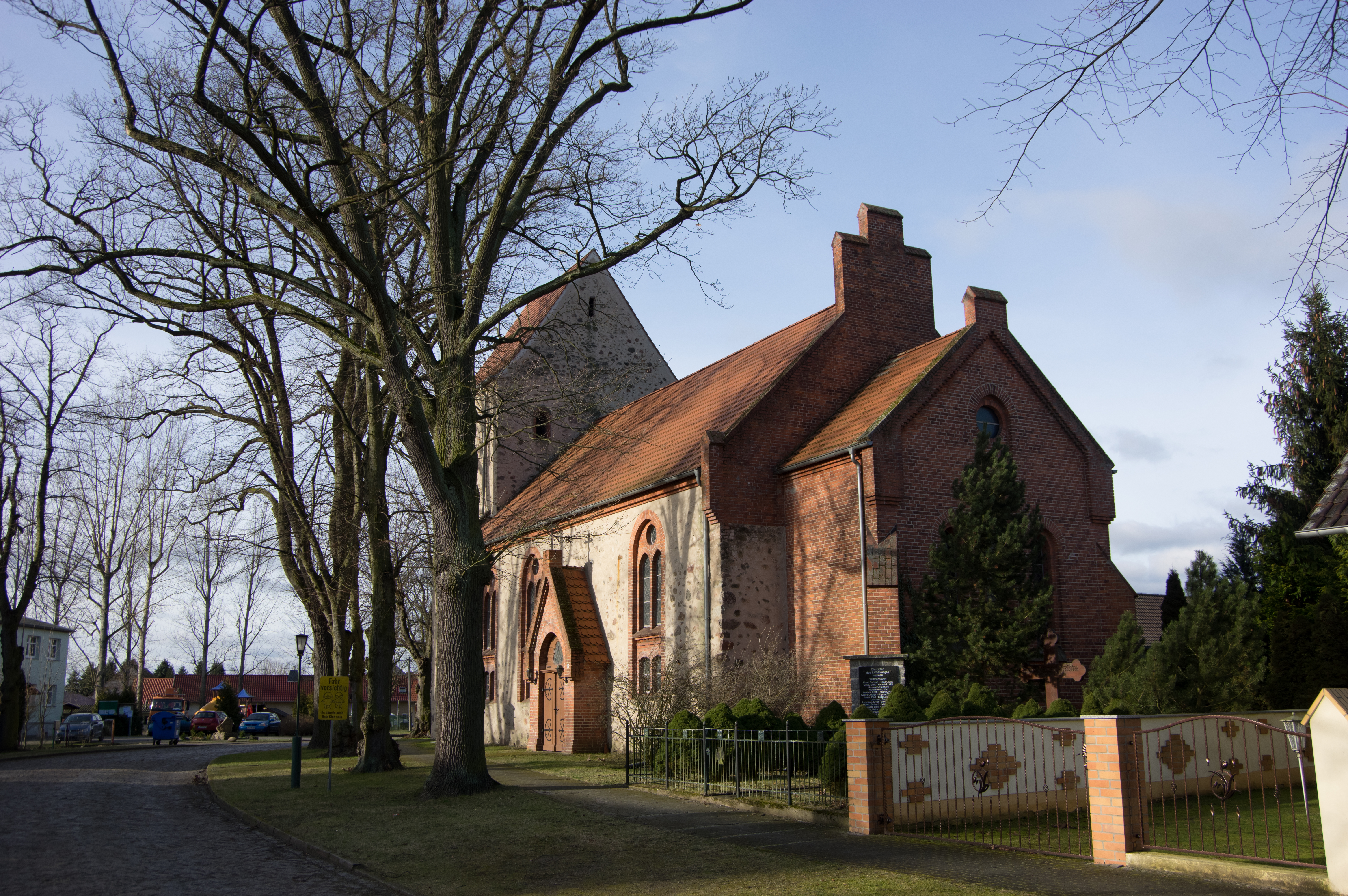 Märkische Heide, Ortsteil Wittmannsdorf in Brandenburg. Die Kirche steht unter Denkmalschutz.